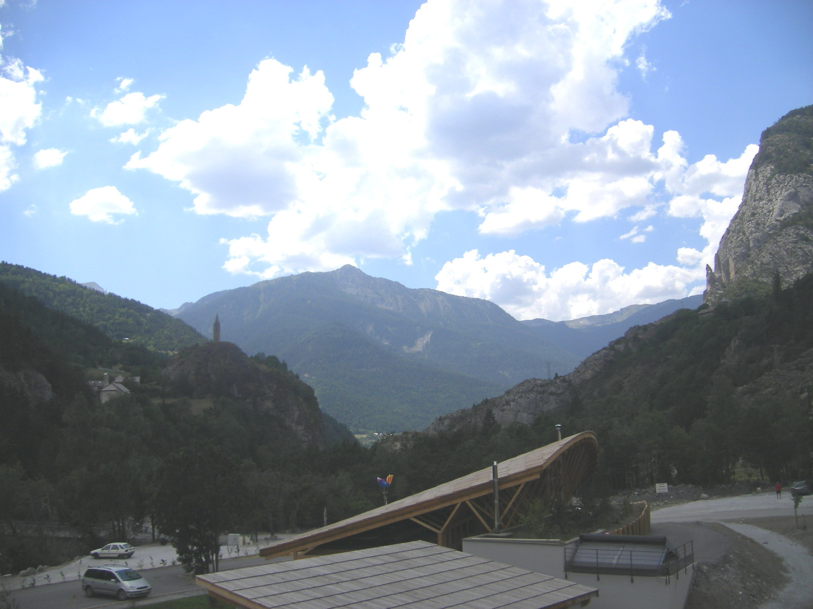 Les Thuiles